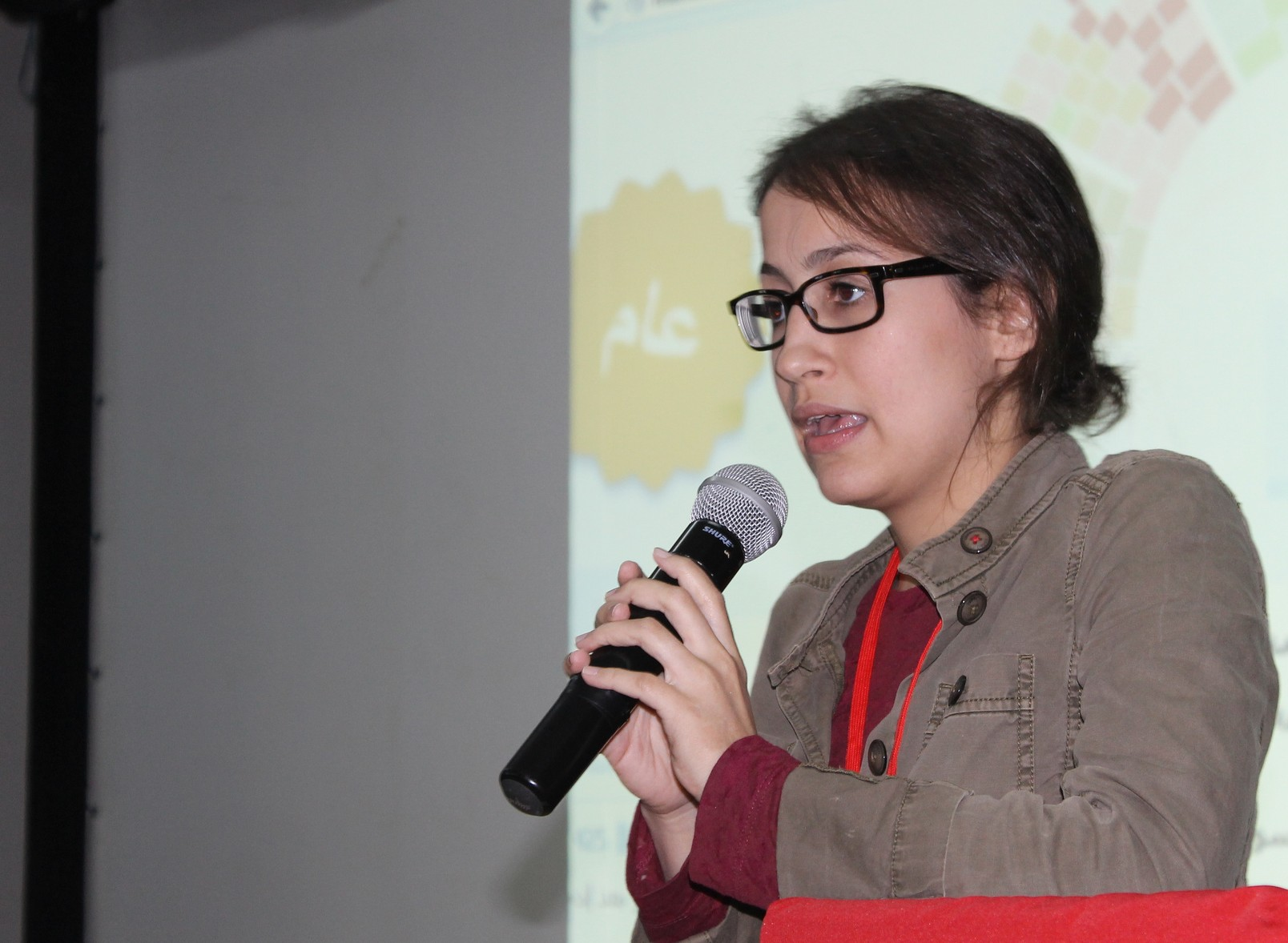 L'activiste tunisienne, amira Yahyaoui, présente son association Al Bawsala lors de la conférence BIL Sayada.